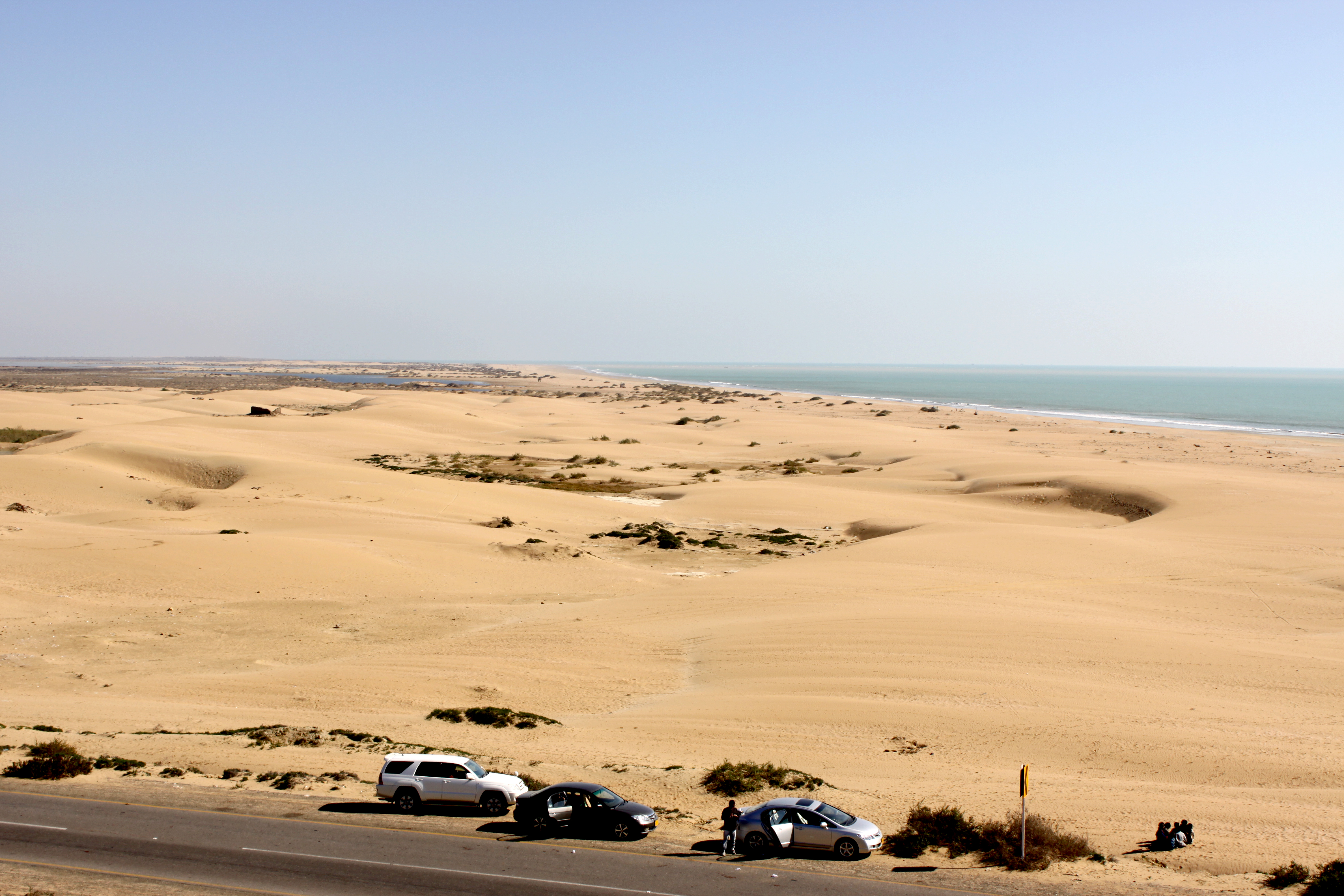 Kund Malir, in Balochistan, Pakistan.